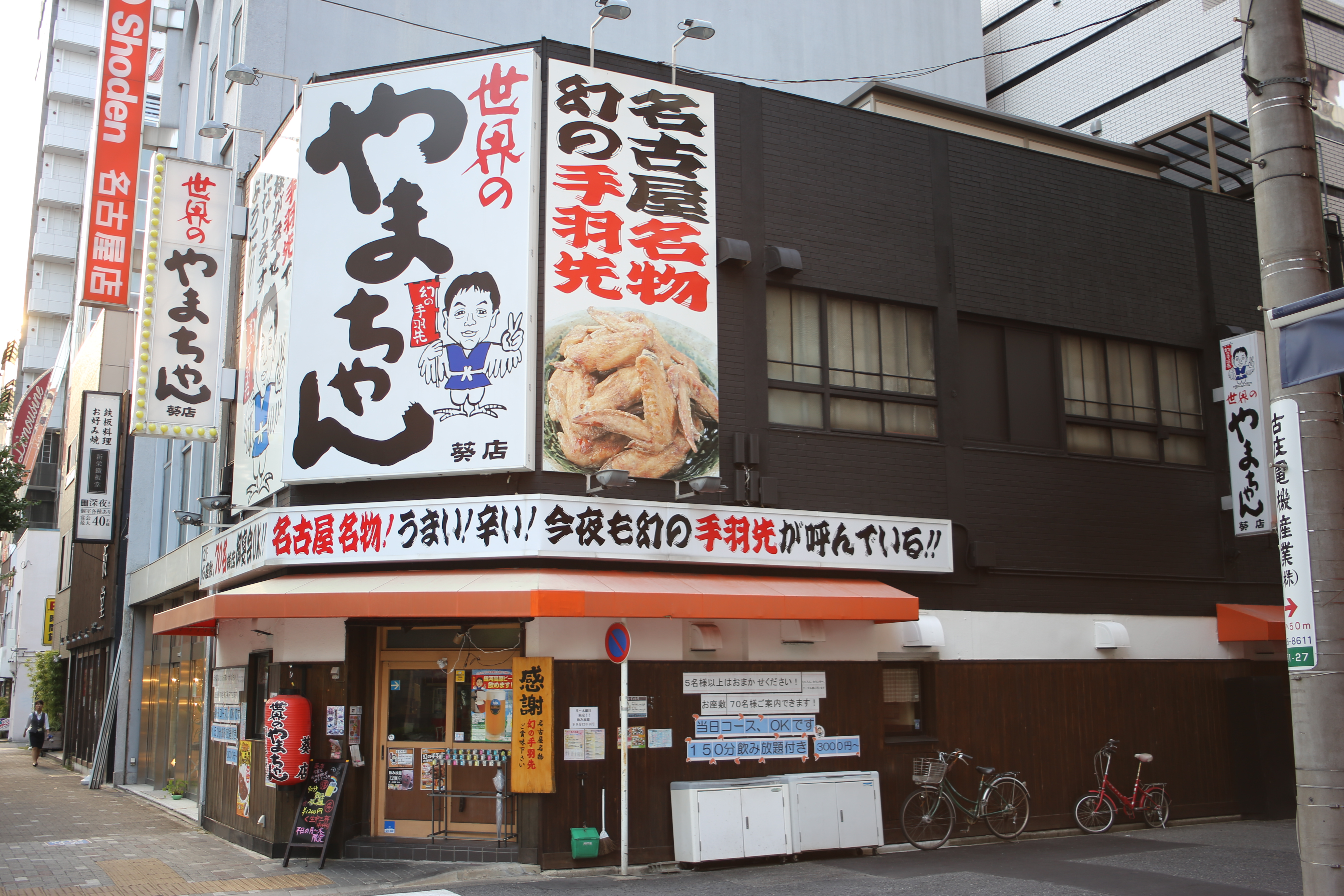 名古屋市中区葵一丁目に所在する世界の山ちゃん葵店を南側公道東側より撮影